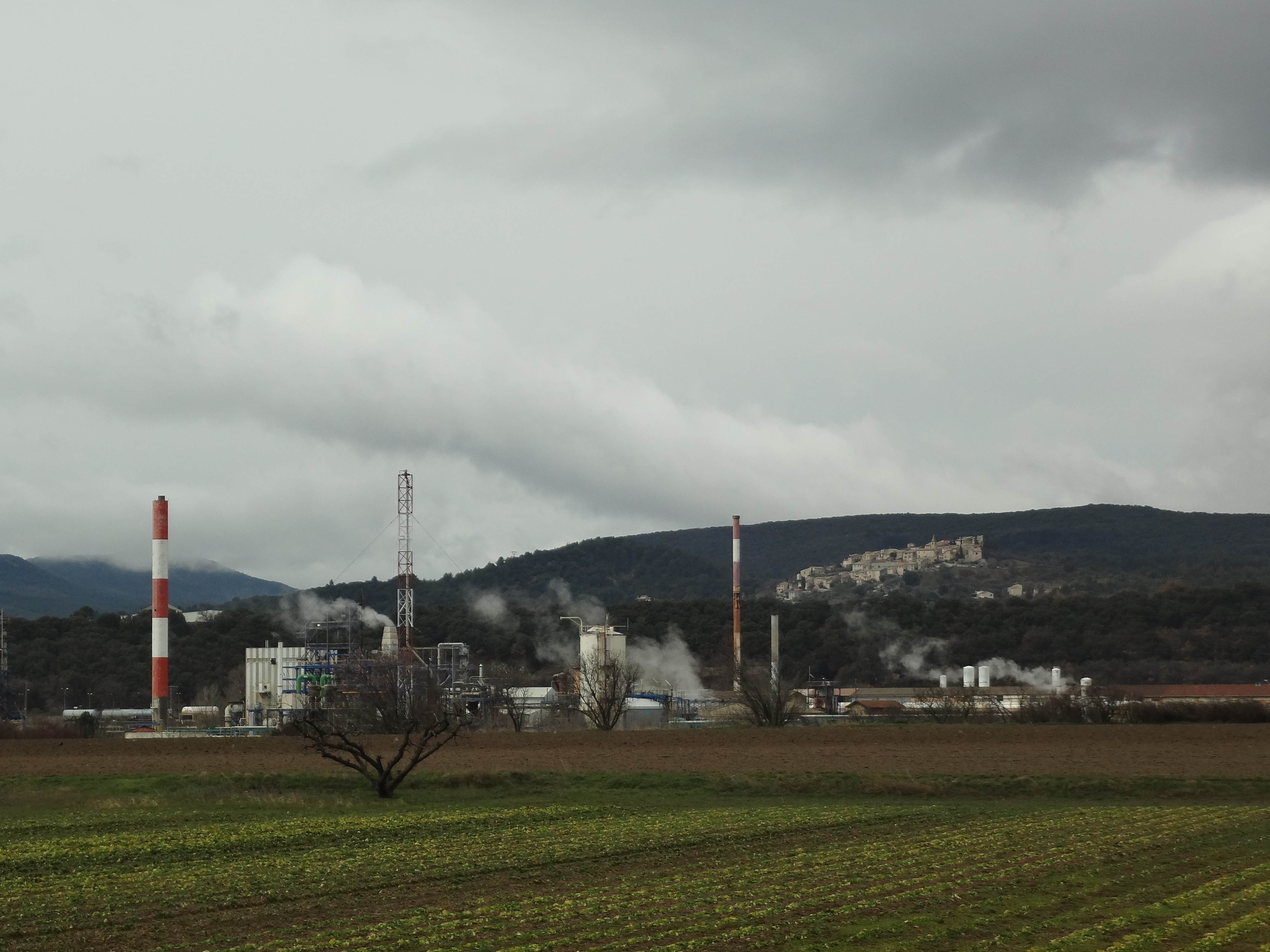 L'usine Arkema de Château-Arnoux-Saint-Auban et Montfort en arrière-plan